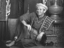 Bild von Reinhard Zabka alias Richard von Gigantikow im Lügenmuseum in Gantikow, Deutschland.